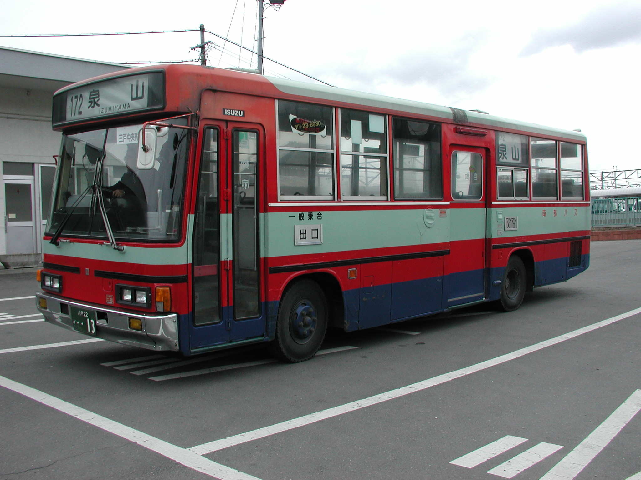 南部バス一般路線旧々塗装＜非冷房車＞（いすゞ・ジャーニーK：P-LR312J）三戸駅にて 2009年9月現在、現役としては最後の旧々塗装かつ非冷房車両である。